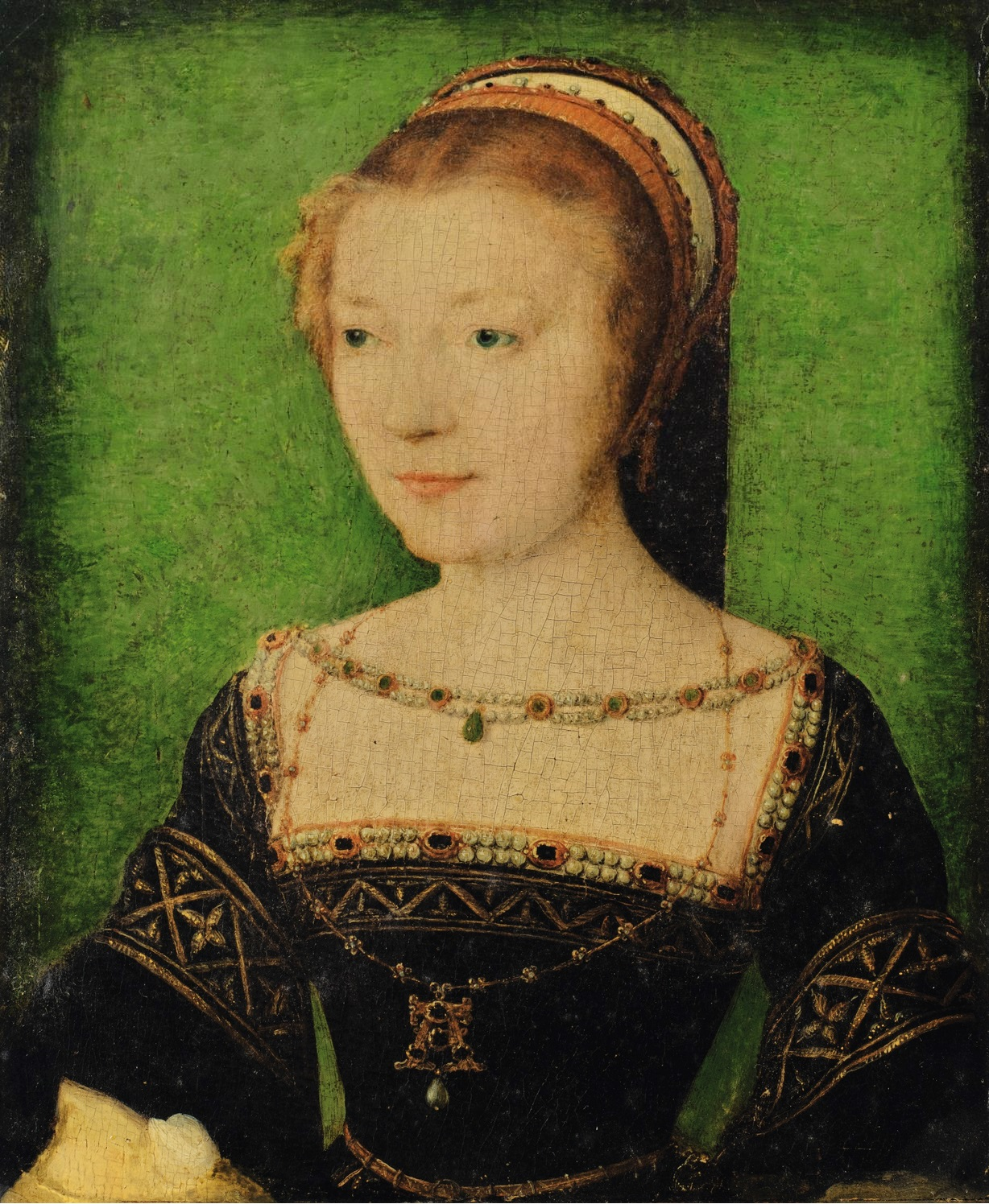 Portrait de la duchesse d'Etampes, vers 1536. Ancienne collection Jacques Bacri.